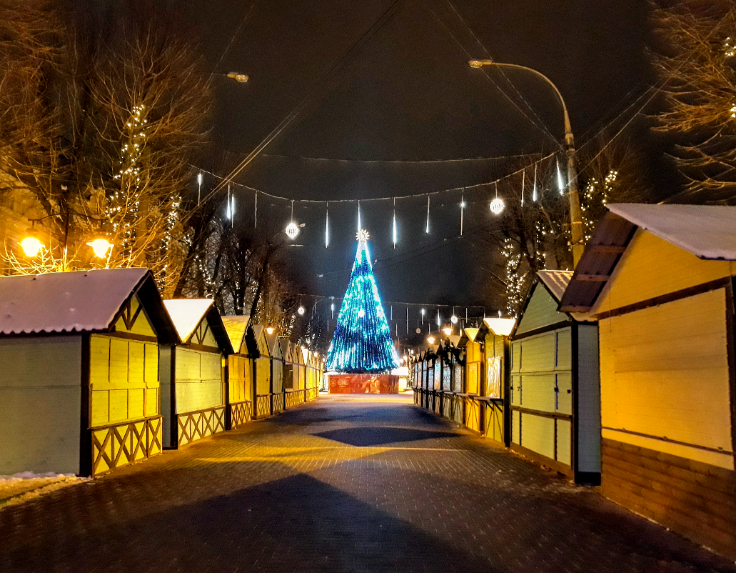 Вечірній Різдвяний Ярмарок у Хмельницькому 11 січня 2019 року. Його останній тиждень роботи в центрі міста. Світлина - Василя Камінського)